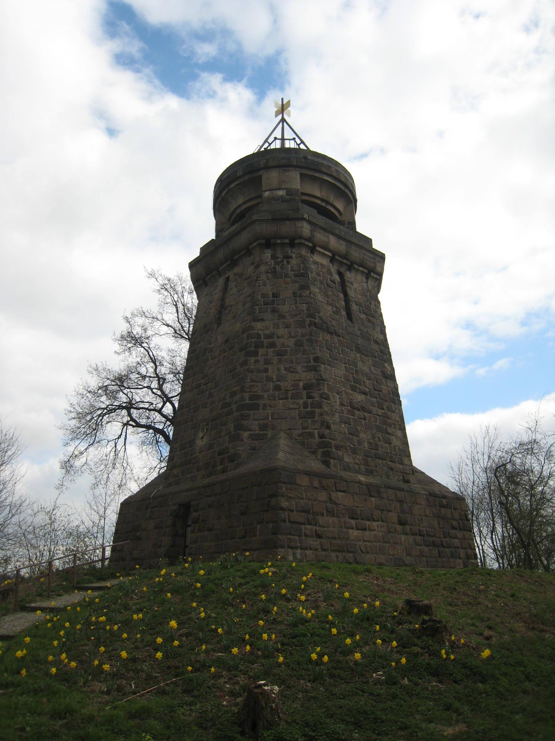 Bismarckturm Unna auf der Friederich-Wilhelm-Höhe